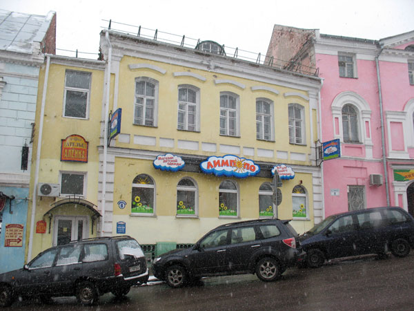 Віцебск. Суворава 6